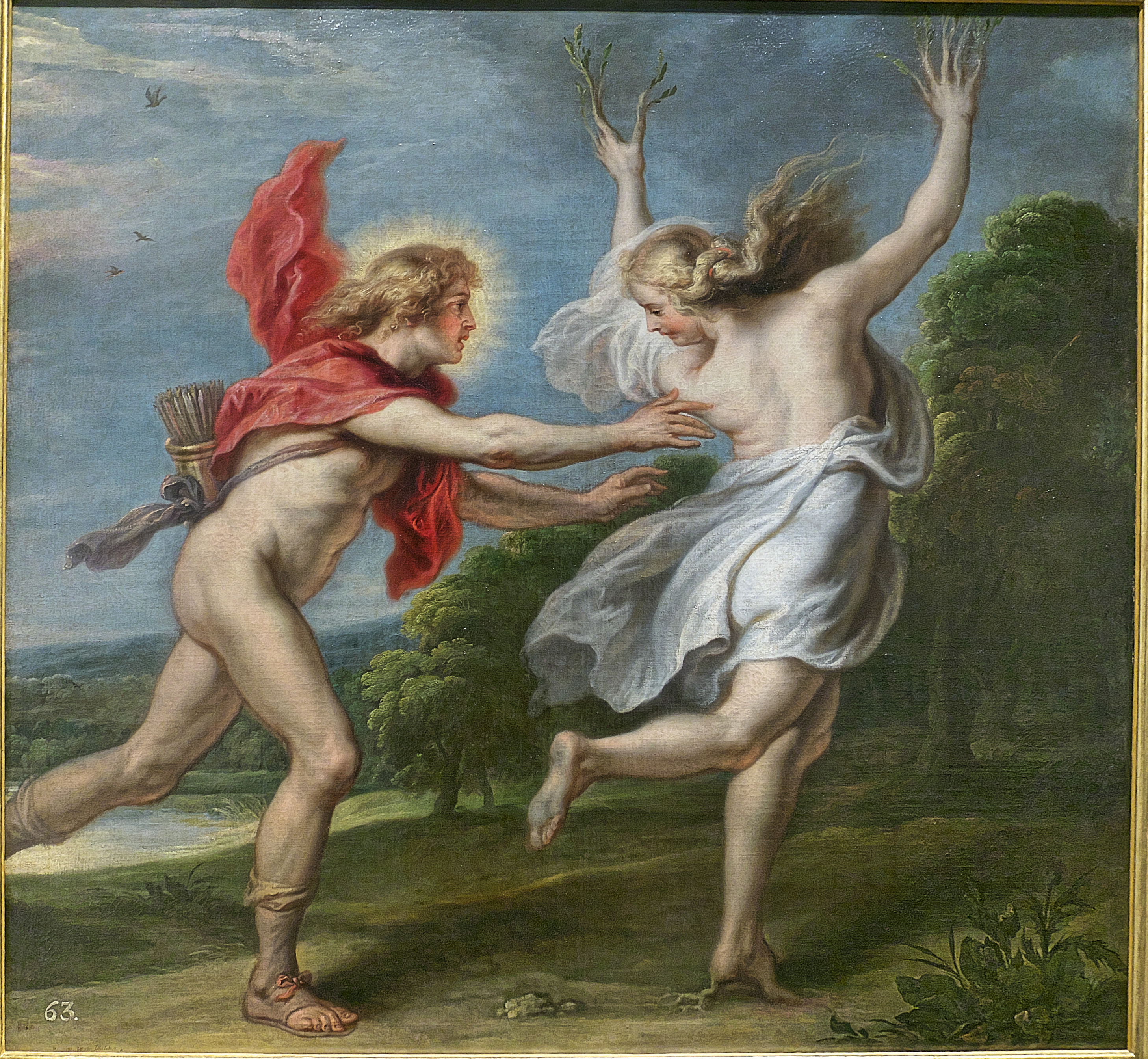 Theodoor van Thulden, colaborador de Rubens, pinta al óleo sobre lienzo (1636-1638), Apolo persiguiendo a Dafne, para la decoración de la Torre de la Parada.